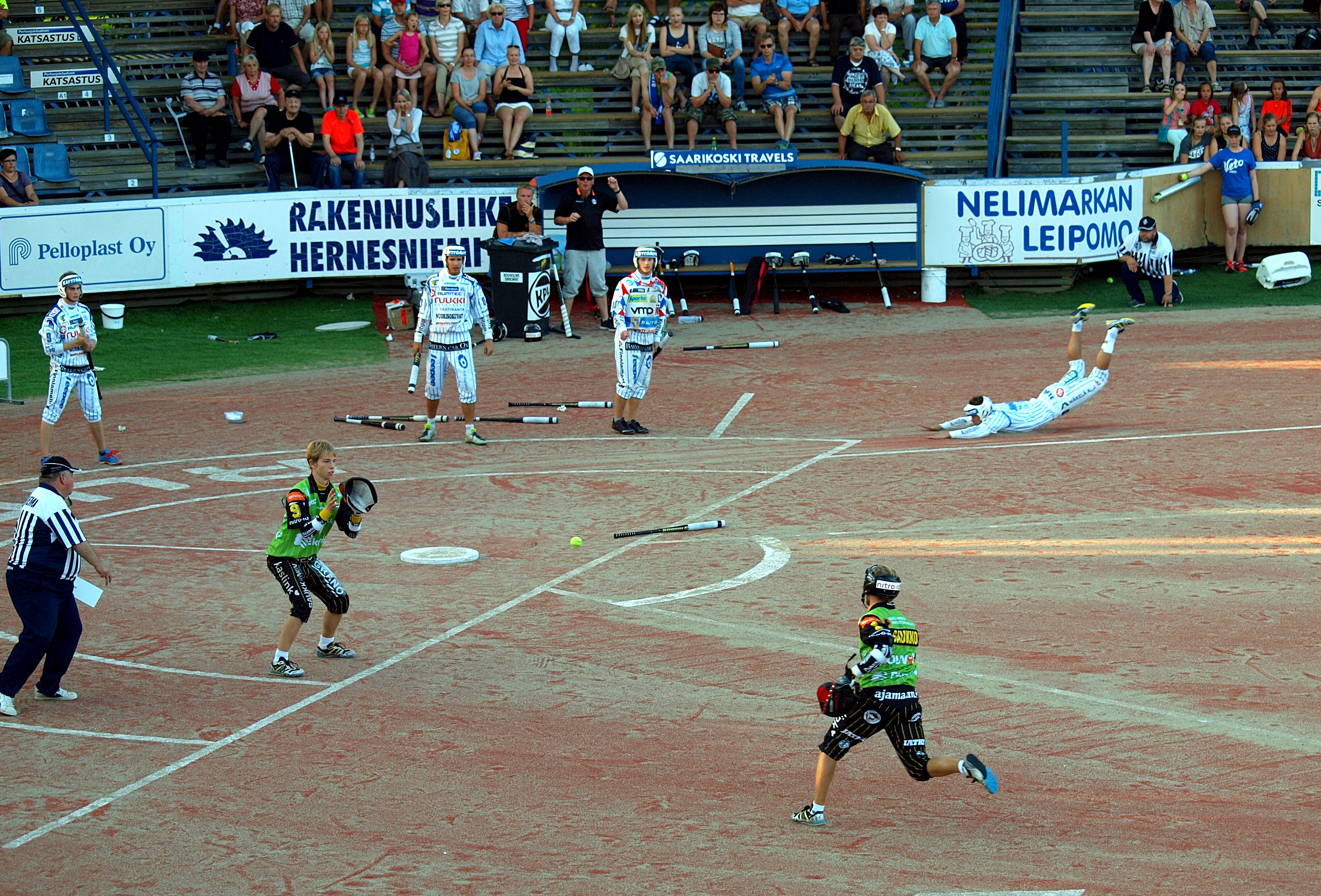 Vimpelin Veto - Kouvolan Pallonlyöjät pesäpallo-ottelu 5.8.2014.